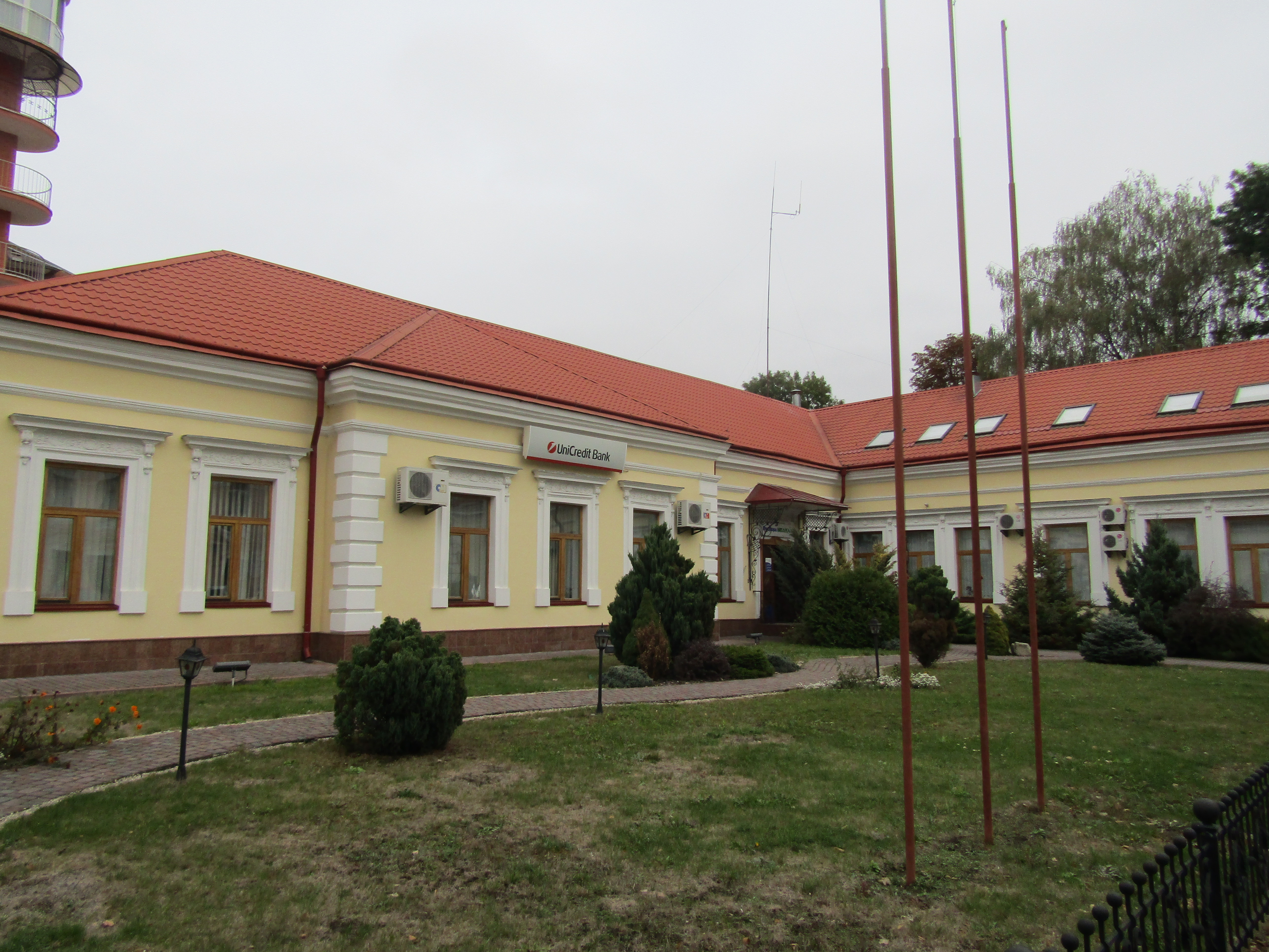 Сучасний вигляд будинку, в якому у 30-их роках ХХ ст. знаходилася гімназія товариства «Рідна Школа» (Тернопіль)